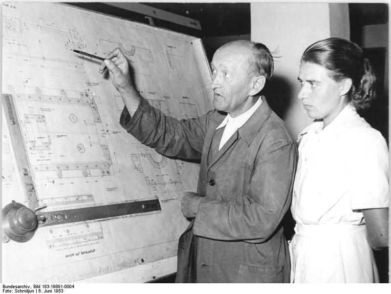 Konstrukteur mit Risszeichnung Zentralbild Schmiljun Zi.Wi. 6.6.1953 In der volkseigenen Maschinenfabrik und Eisengiesserei Dresau. UBz: Kollege Franz Friedrich ist 1. Konstrukteur und Gruppenleiter. Er ist an der Neuentwicklung von Großgetriebe für das Walzwerk maßgeblich beteiligt und wurde daher am 1.5.1953 als Aktivist ausgezeichnet. Nach seinen Vorschlägen wurden die Getriebe für Absetzer und Eimerkettenbagger konstruiert. Damit schuf er die Voraussetzung für eine höhere Braunkohlenförderung. Nach seinen Konstruktionen gebaute Maschinen stellen einen wert von 1 100 000.-DM dar. Die technische Zeichnerin Ursula Matzik verpflichtete sich zu Ehren des 60. Geburtstages von Walter Ulbricht, sich soweit fachlich zu bilden, daß sie als Teilkonstrukteurin eingesetzt werden kann.